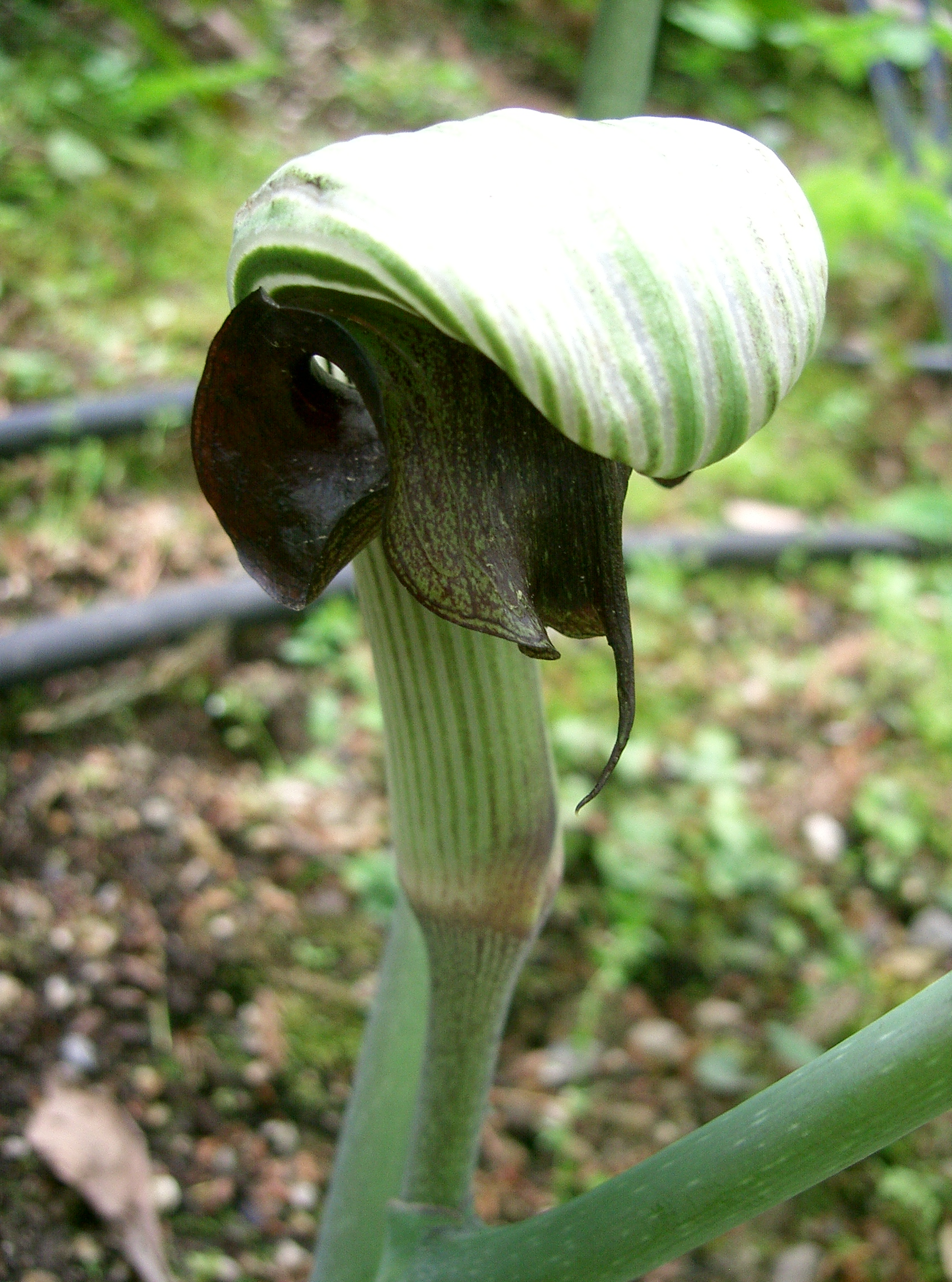 Scientific name Arisaema ringens